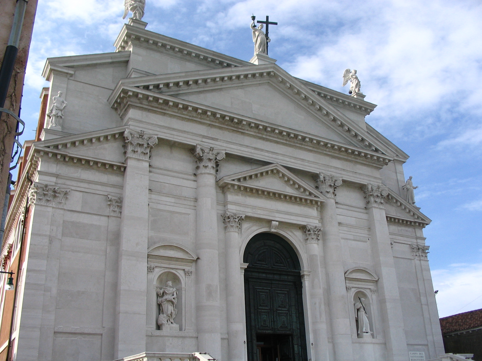 Frente de Chiesa del Redeltore, Venezia